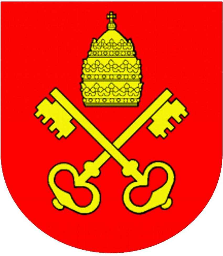 Gemeindewappen von Grengiols